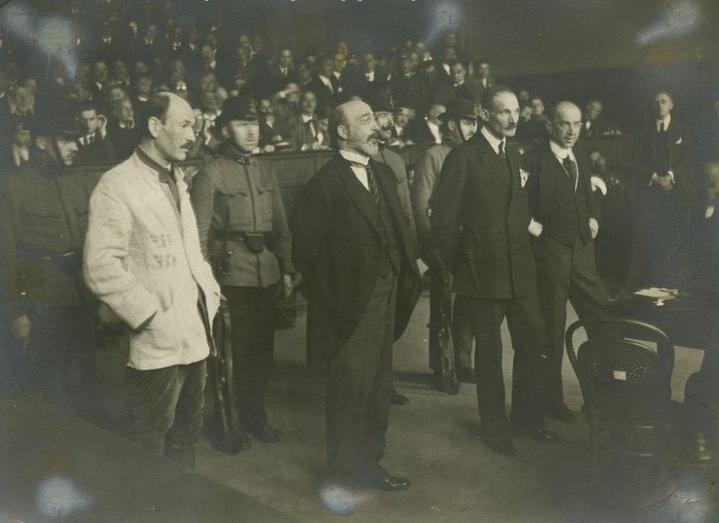 Tisza-per; Ítélethirdetés, Kéri Pál, Fényes László, Gärtner Marcell és Wilheim-Vágó Jenő vádlottak